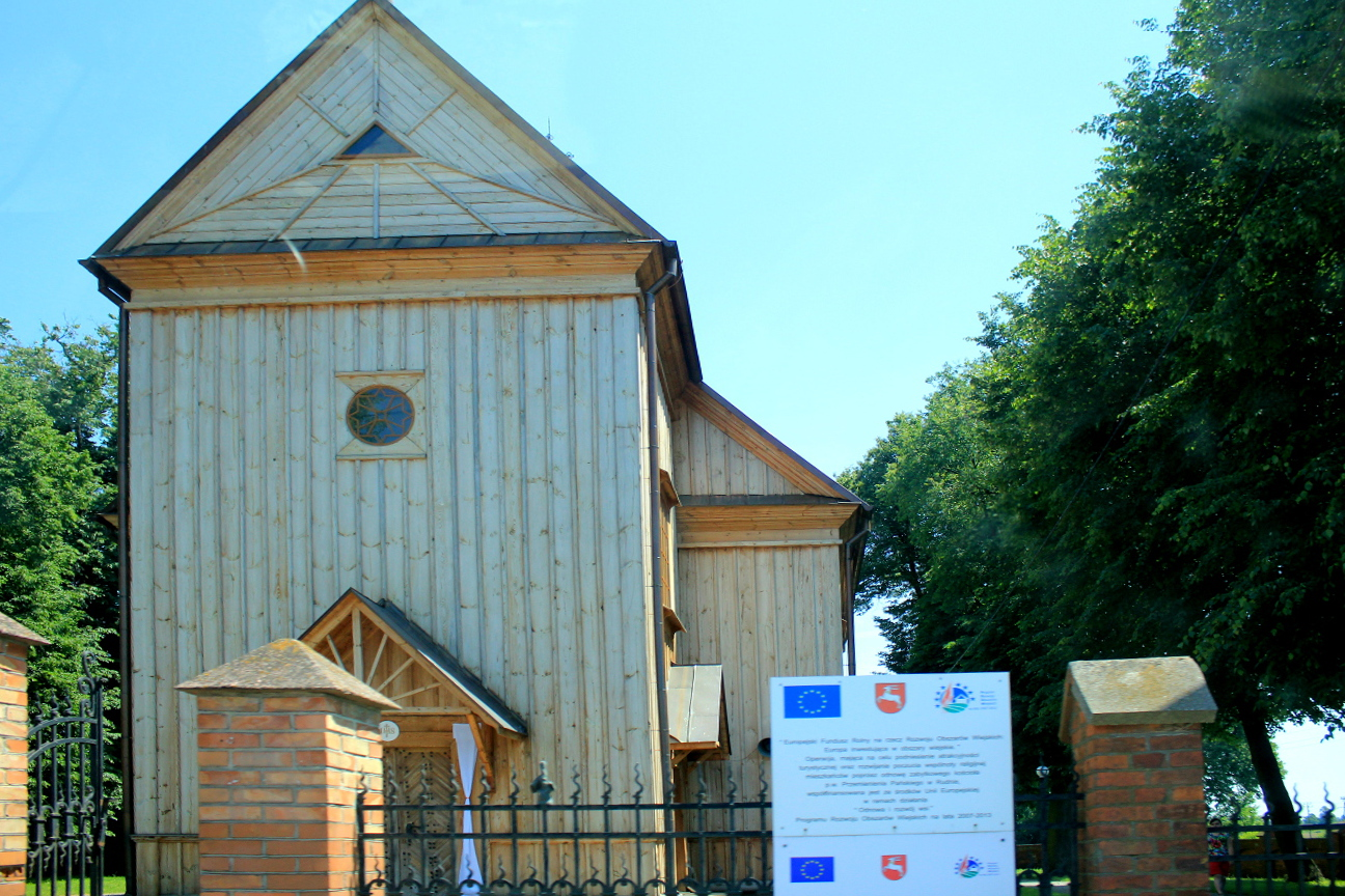 Kościół Przemienienia Pańskiego w Rudnie